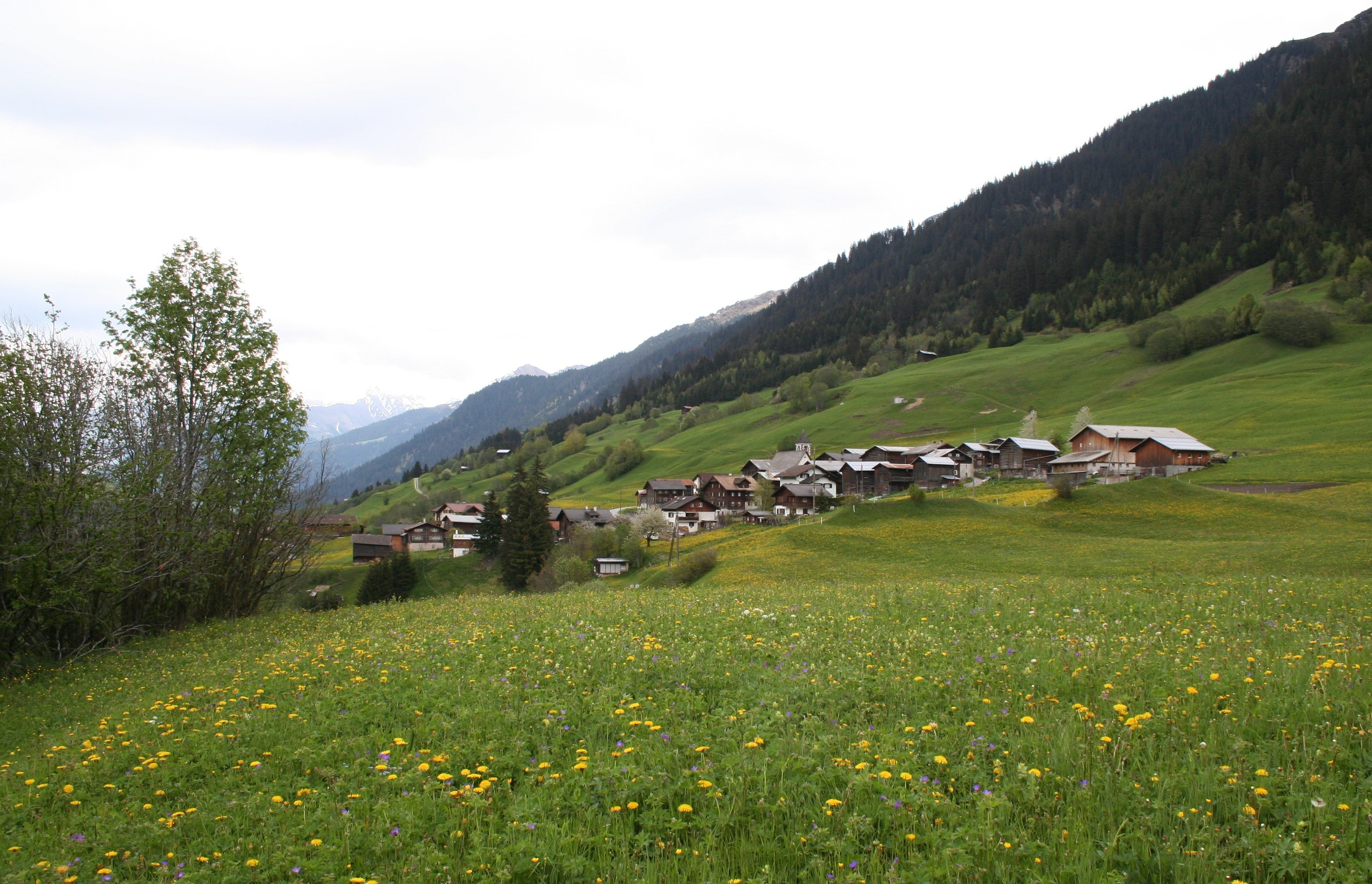 Surin bei Lumbrein